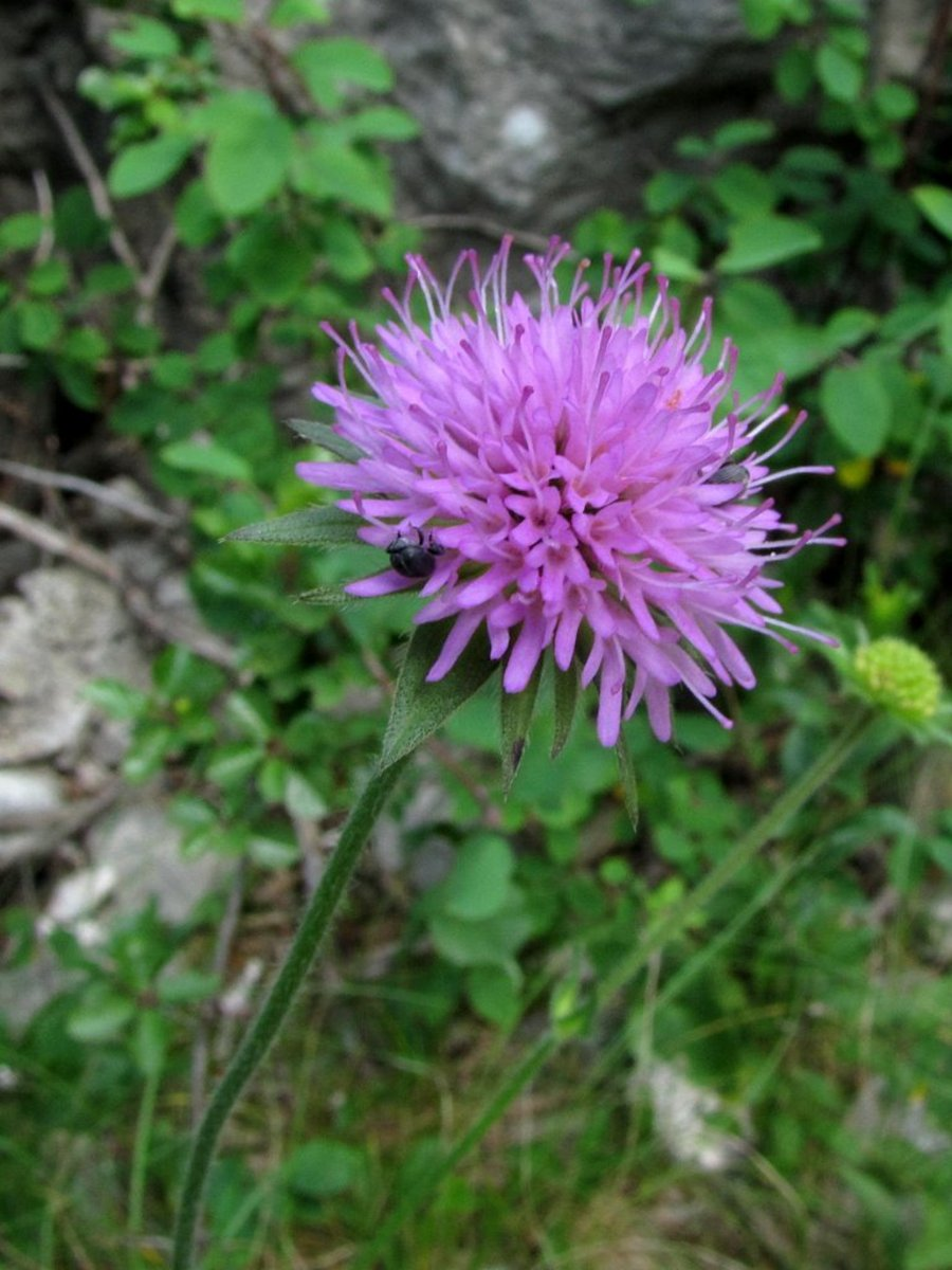 Ilirsko grabljišče na Južnem pobočju Gore nad Ajdovščino.